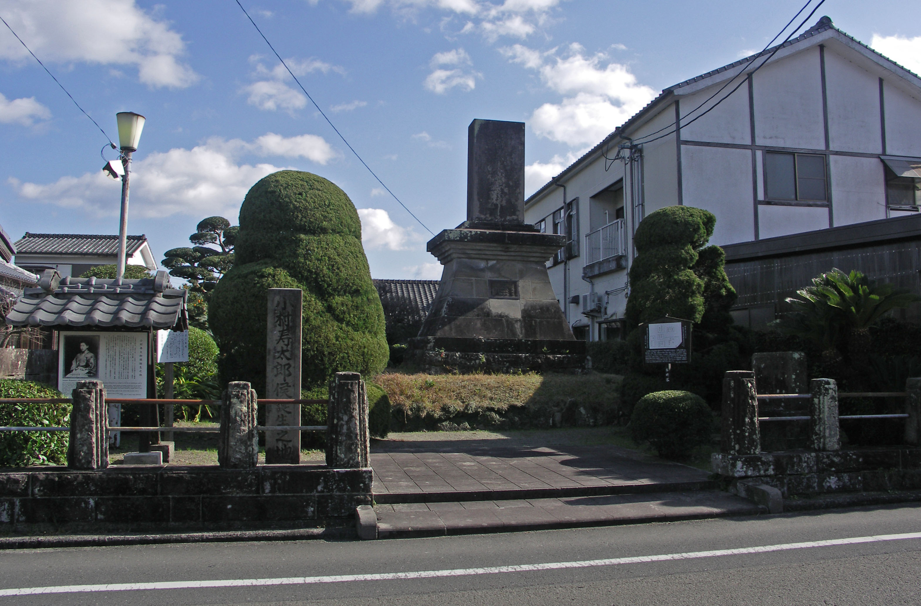 小村寿太郎侯誕生の地。